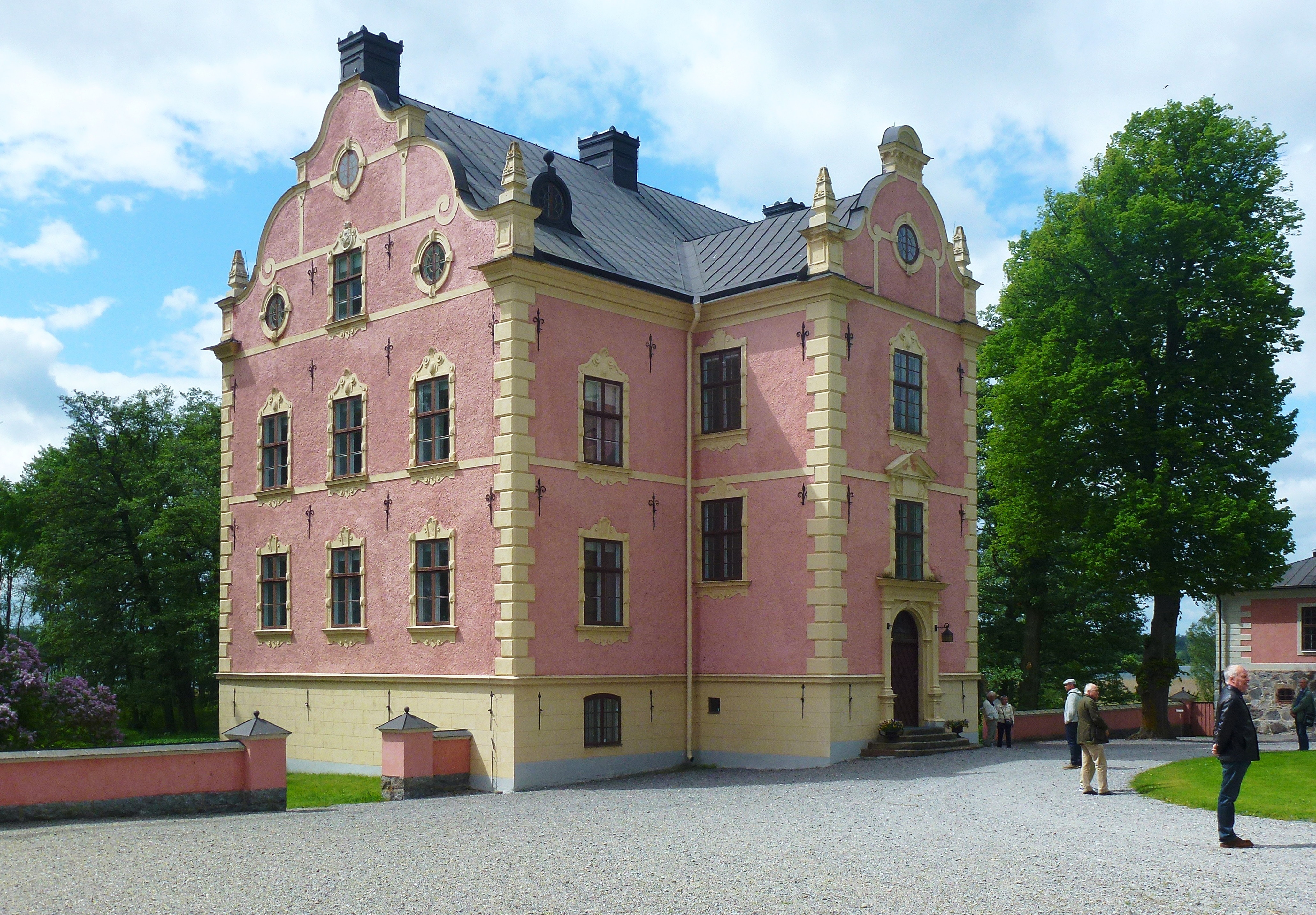 Skånelaholm huvudbyggnad fasaderna mot öster